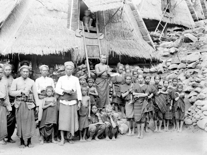 Negatief. De bevolking van Doö Donggo voor een kamponghuis